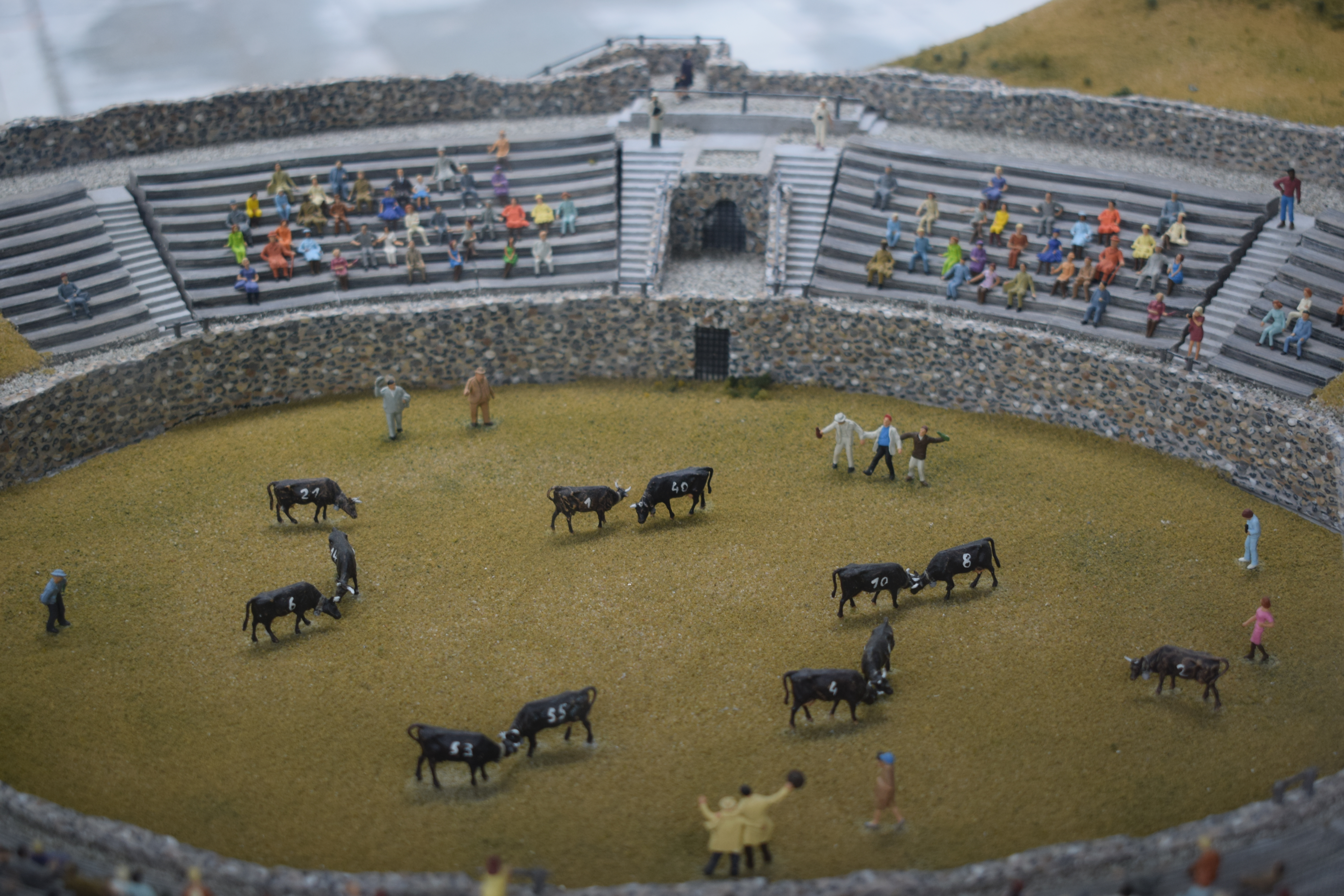 Vue de Martigny, dans le canton du Valais en Suisse.